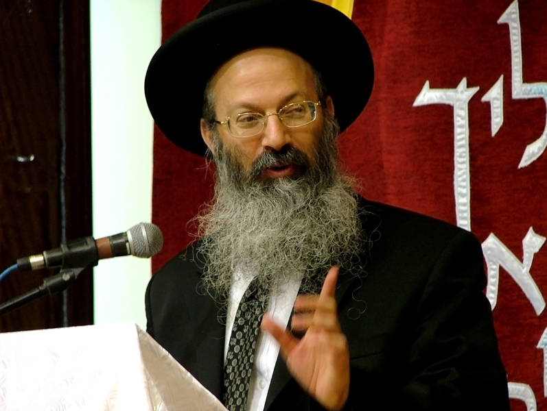 תמונתו של הרב אליעזר מלמד שליט"א